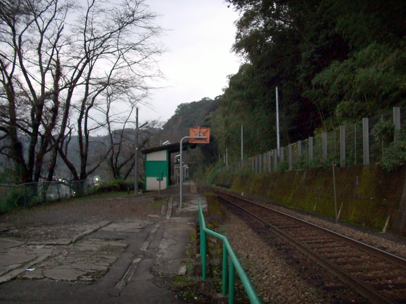 鬼瀬駅ホーム